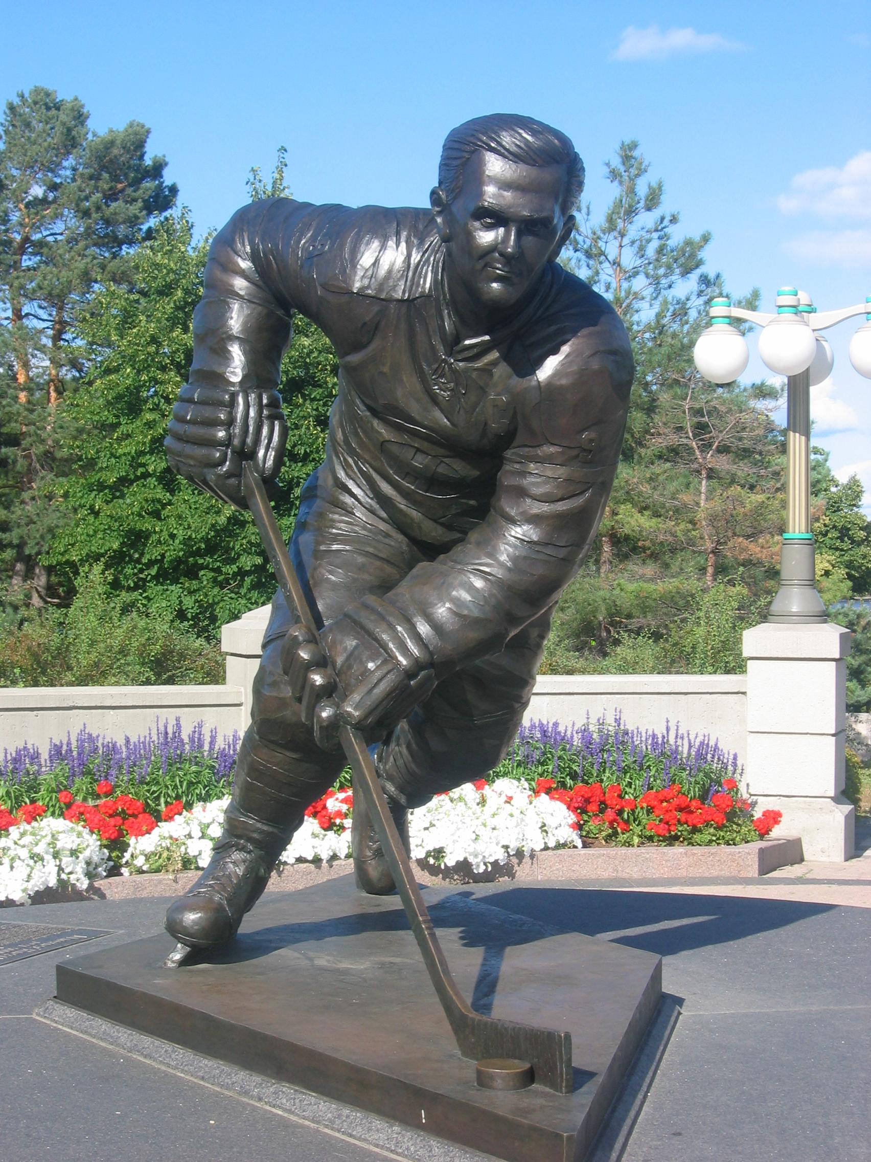 Statue de Maurice Richard à Gatineau (Québec)